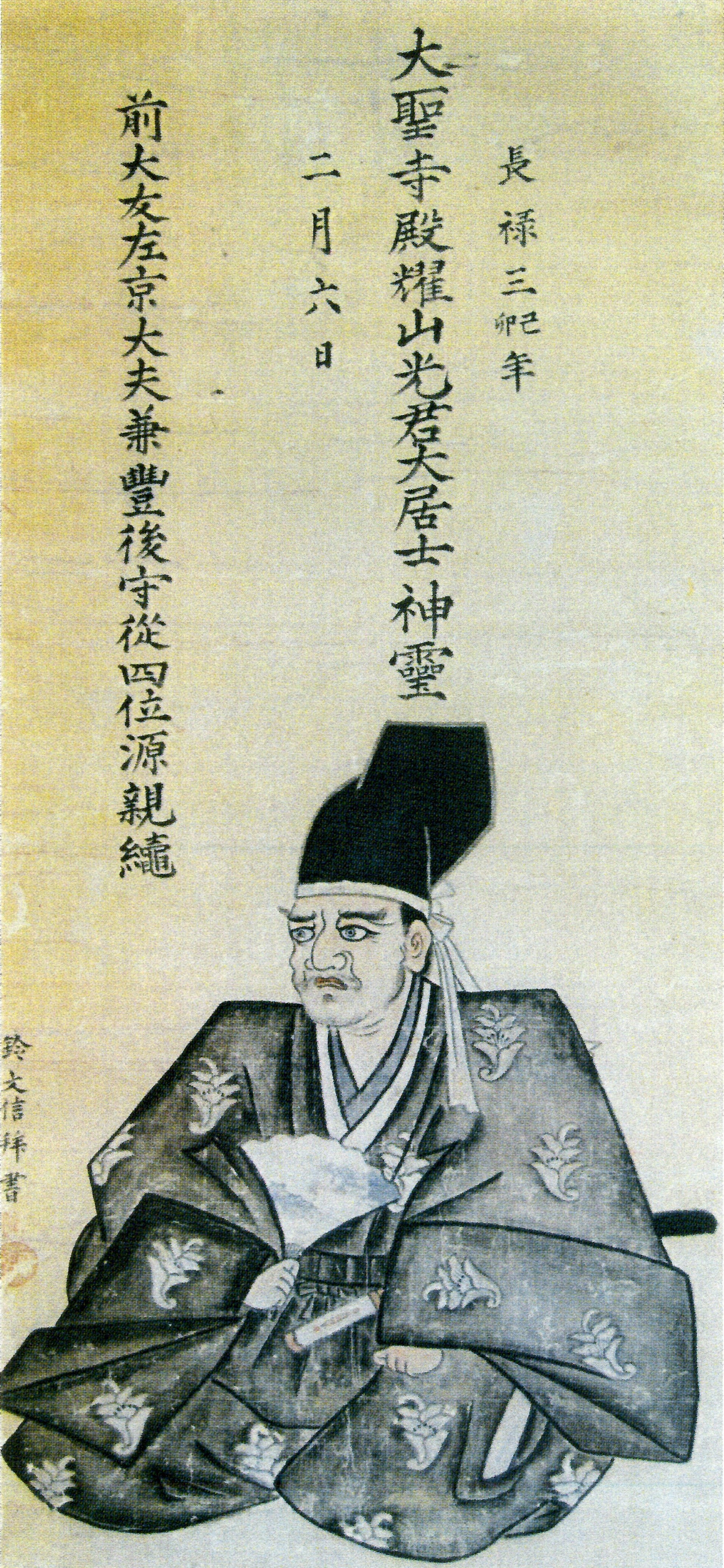 大友親綱の肖像。